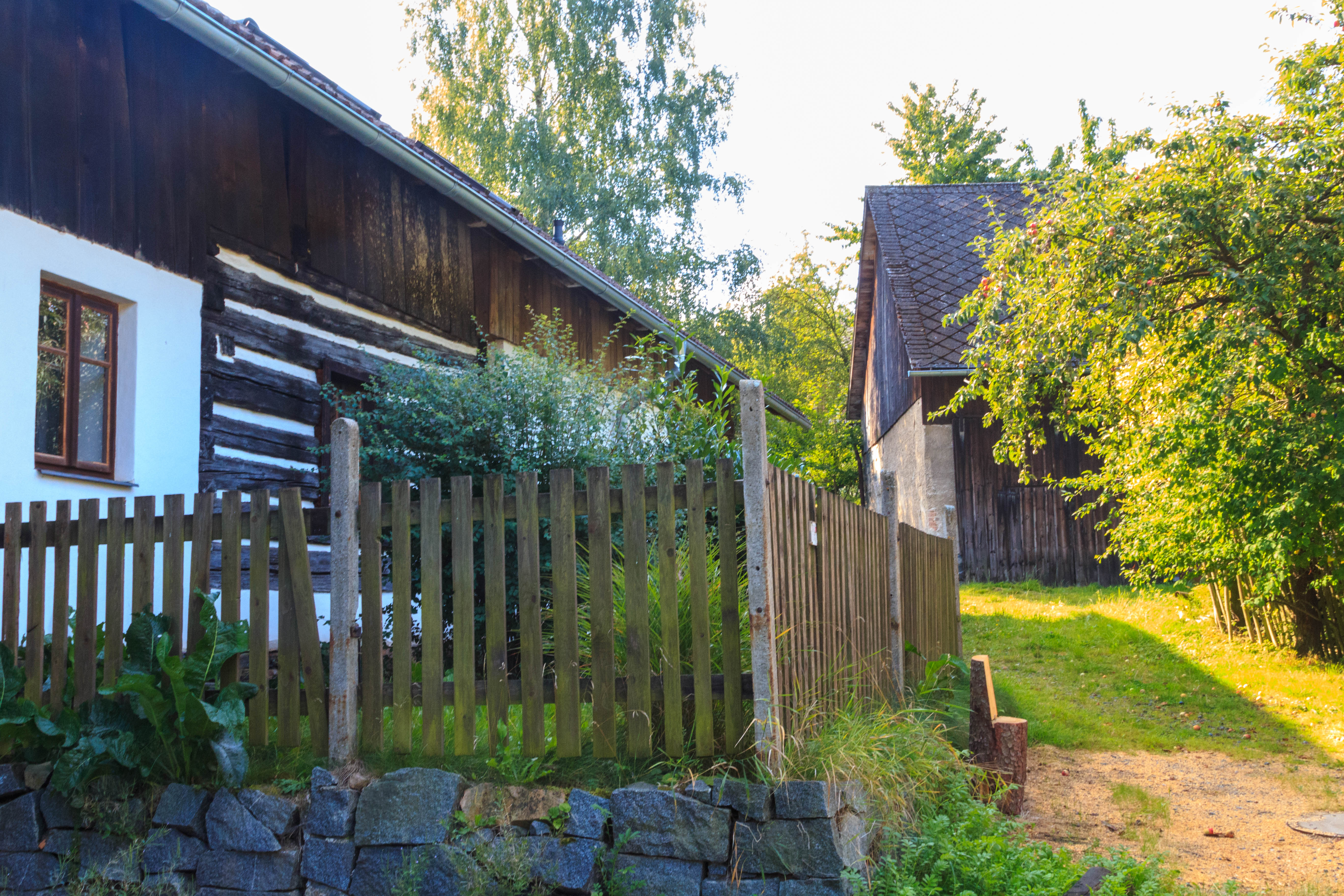 Bystřice u Včelákova - čp. 5